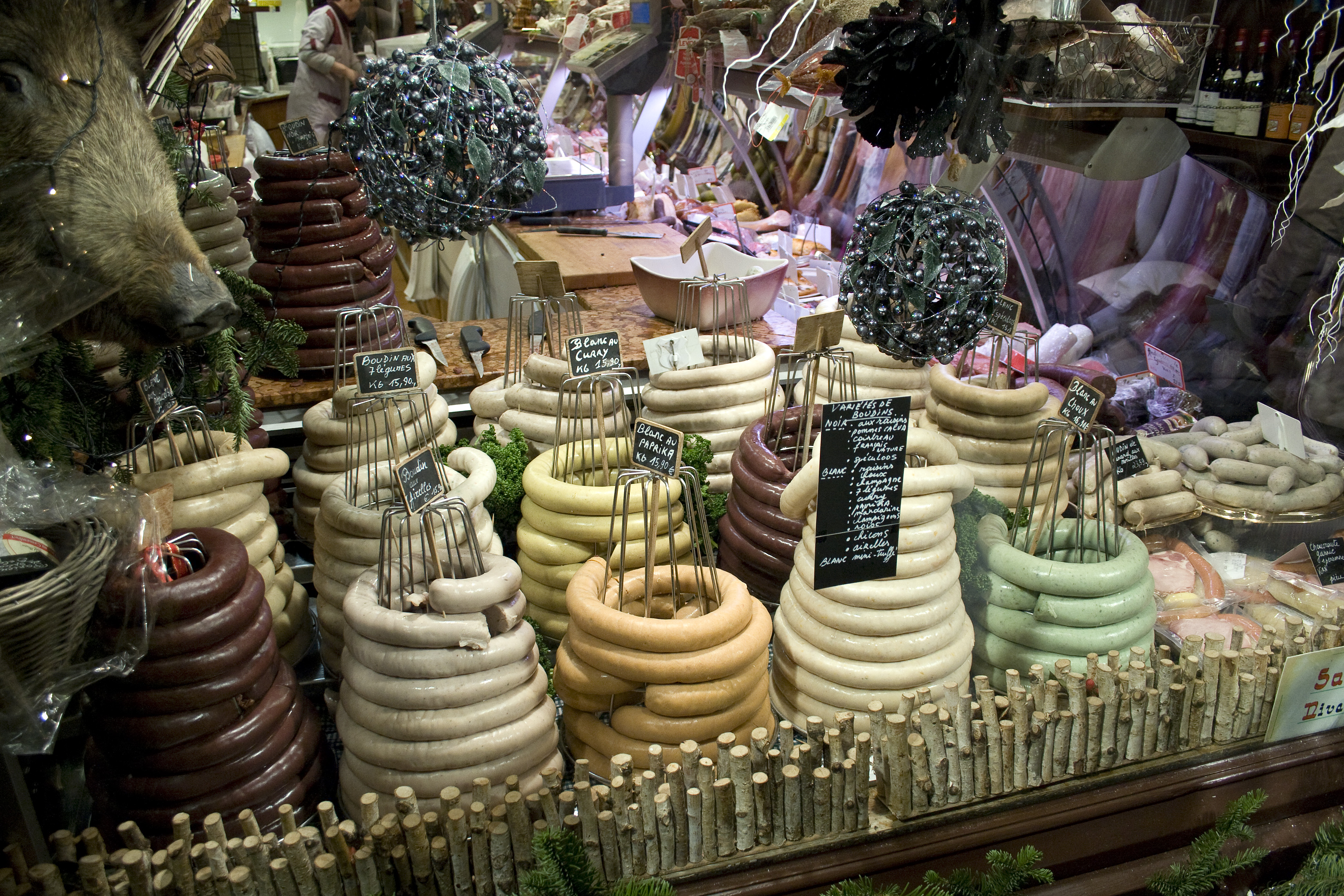 Boudins noir et blanc au marché de Noël de Bruxelles